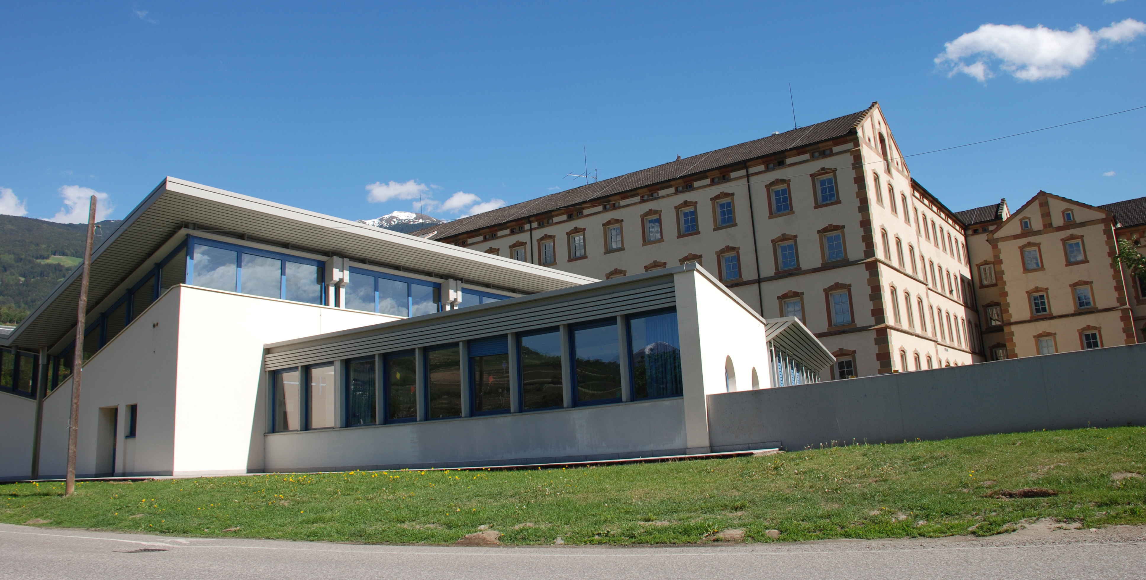 Die im Jahr 2003-2004 neu erbaute Turnhalle des Vinzentinums im Brixen.